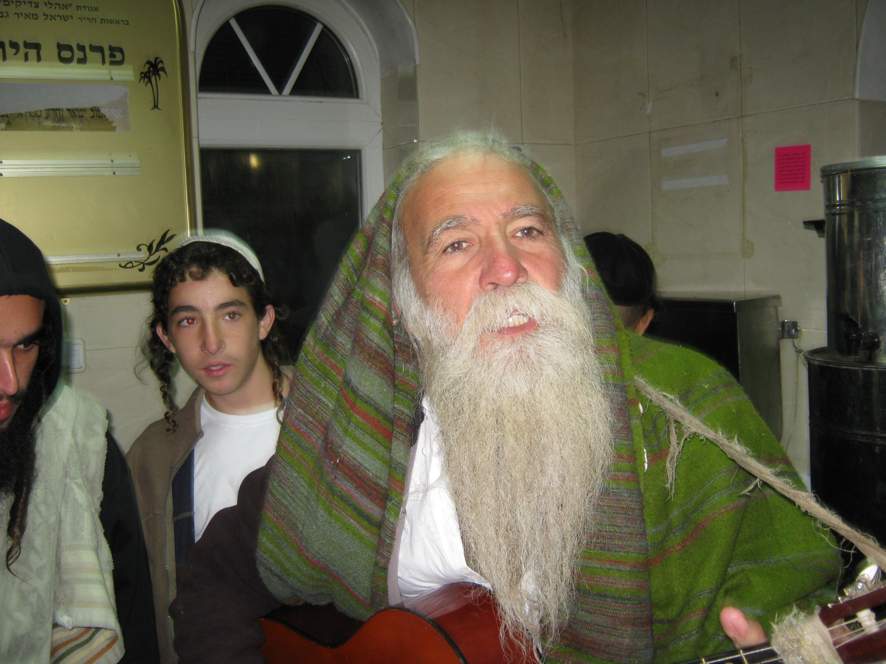 דוד (הכי טוב) דבש שר ומנגן בחדר התה אשר ממול לציון הקדוש של רבי נחמן באומן